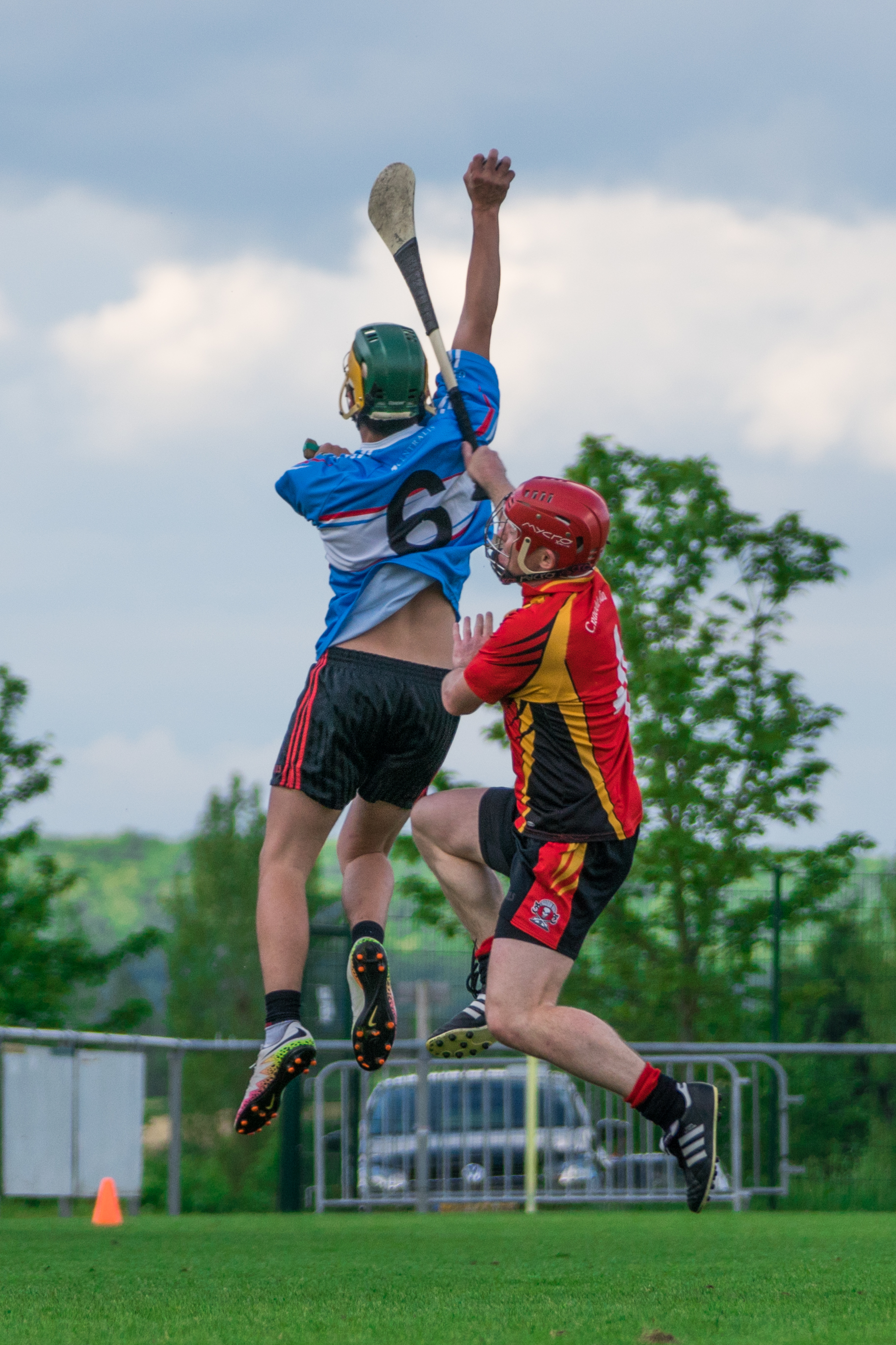 Ein Spieler aus Luxemburg fängt im Zweikampf gegen einen belgischen Spieler den Sliotar.